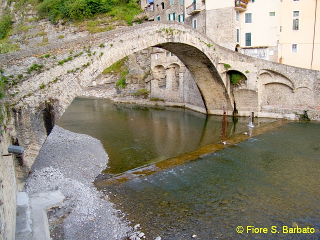 Wikipedia: Dolceacqua .